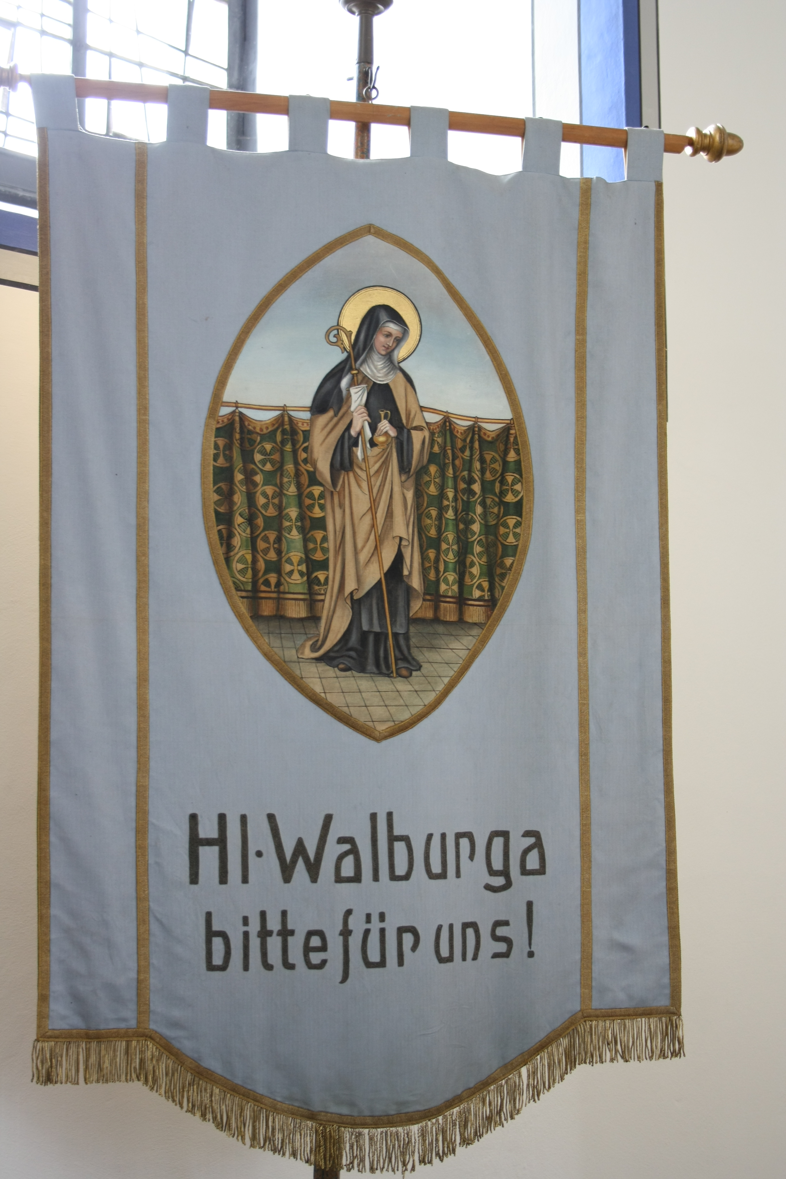 Fahne in der katholischen Kirche St. Walburga in Gelsdorf, Ortsteil von Grafschaft, Darstellung: hl. Walburga